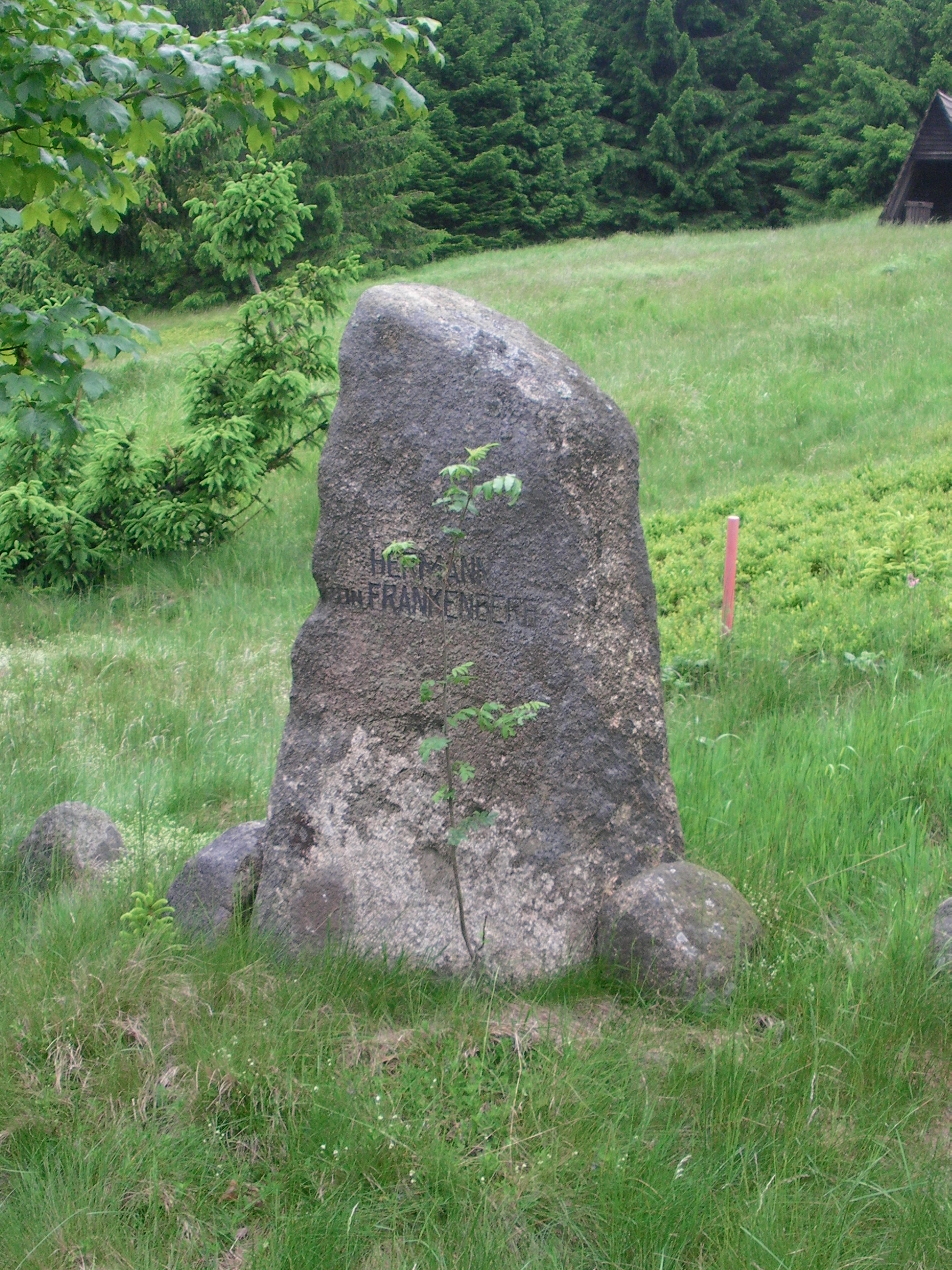 Der Frankenberg-Stein erinnert an Hermann von Frankenberg und Ludwigsdorf (* 10. März 1865 in Blankenburg (Harz); † 10. Januar 1931 Köterberg) einen deutschen Verwaltungsjuristen und Hauptvorsitzenden des Harzklubs.